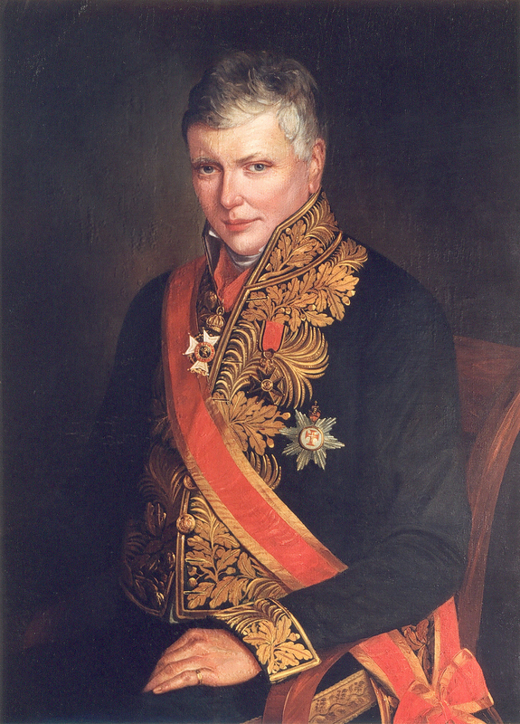 Comte Emile d'Oultremont, premier ambassadeur du Royaume de Belgique près le Vatican